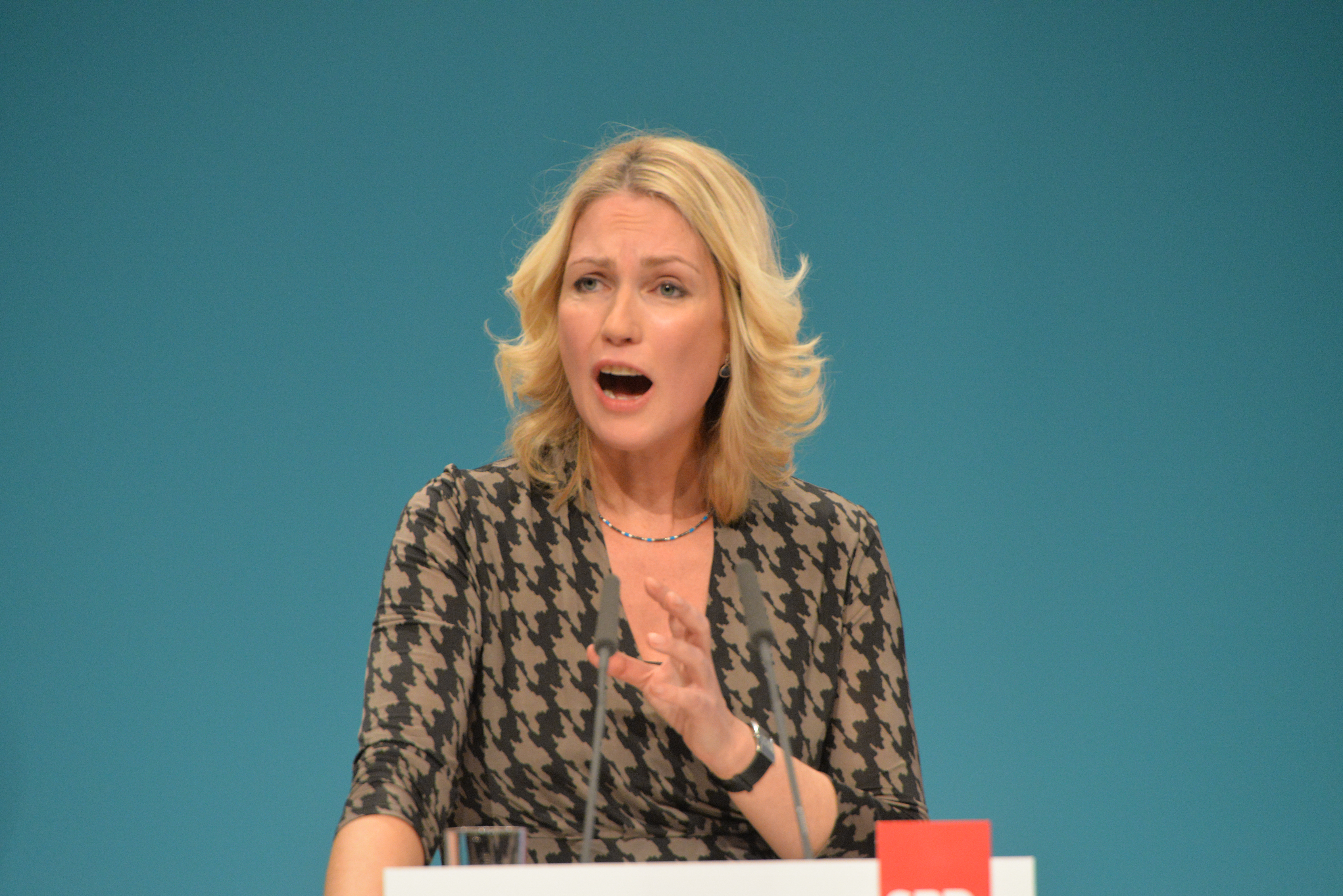 SPD Bundesparteitag Berlin, 10.-12. Dezember 2015, CityCube, Messe Berlin